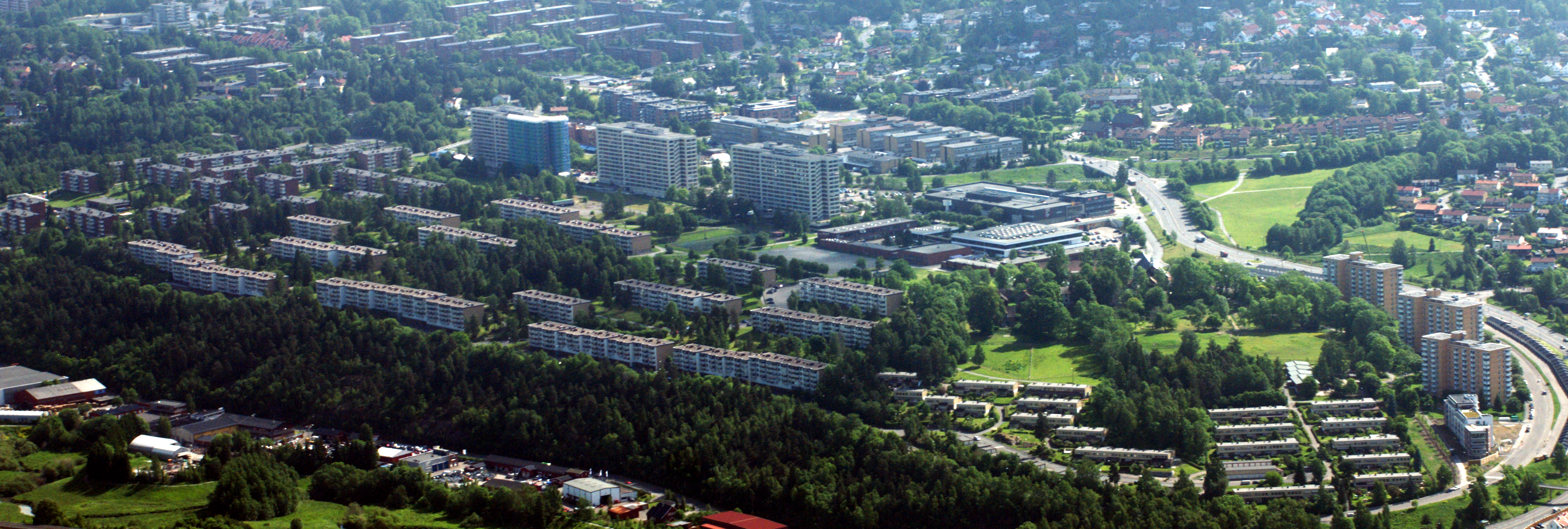 Tveita